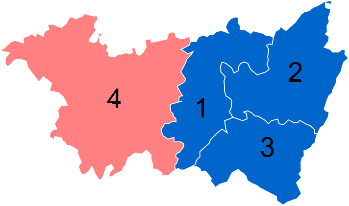 Résultats des élections législatives des Vosges en 2012